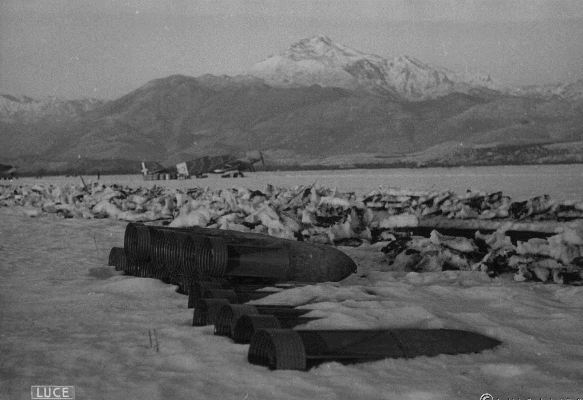 Savoia Marchetti S.79 Sparviero a Scutari Albania 1941